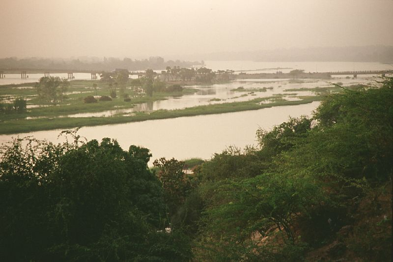 Niger River near Niamey, Niger